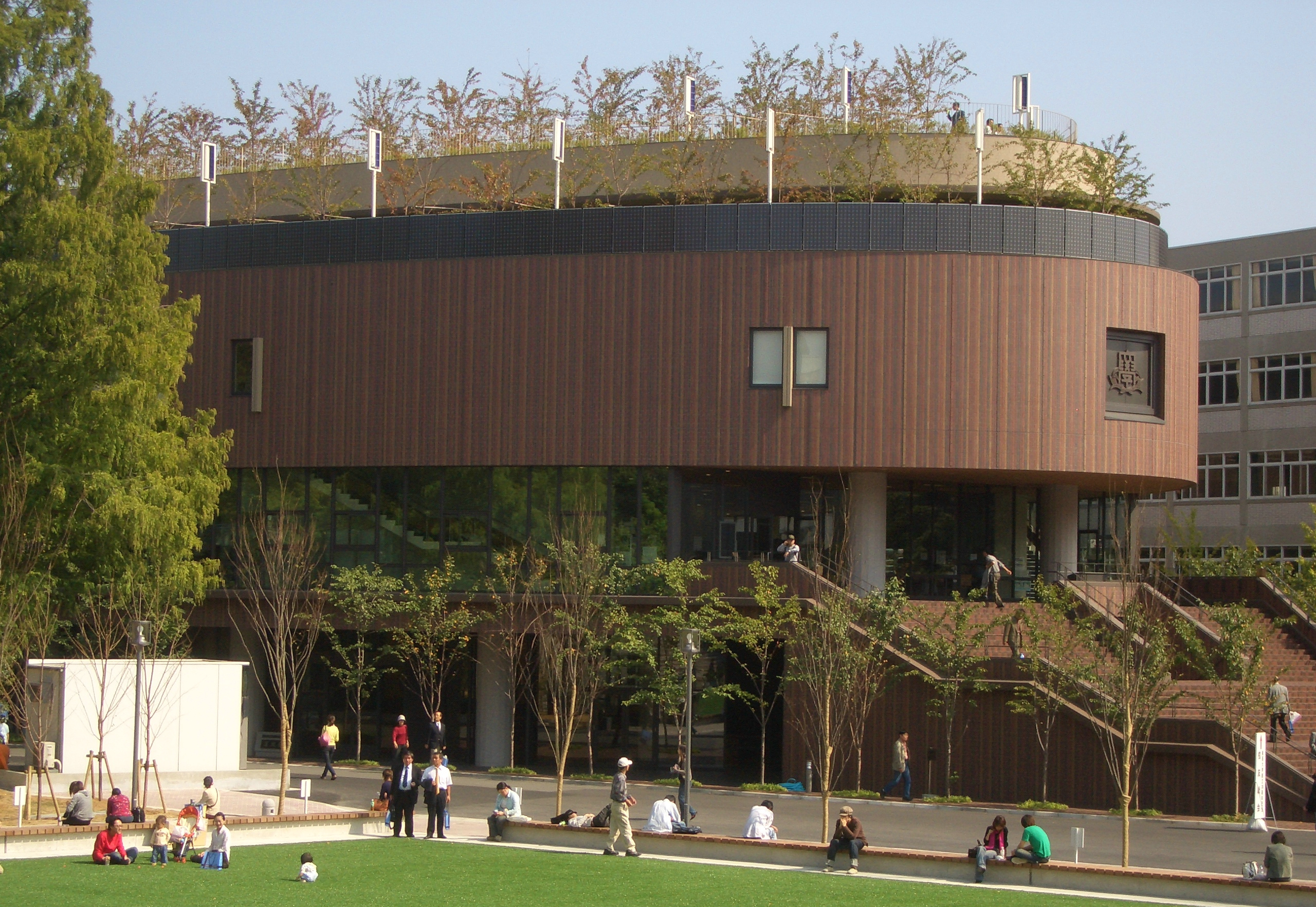 Kansai University。関西大学。